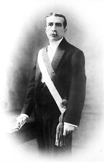 Augusto Bernardino Leguía y Salcedo (1863 - 1932). Presidente del Perú en dos ocasiones, de 1908 a 1912 y de 1919 a 1930.